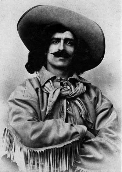 Brazil Jack